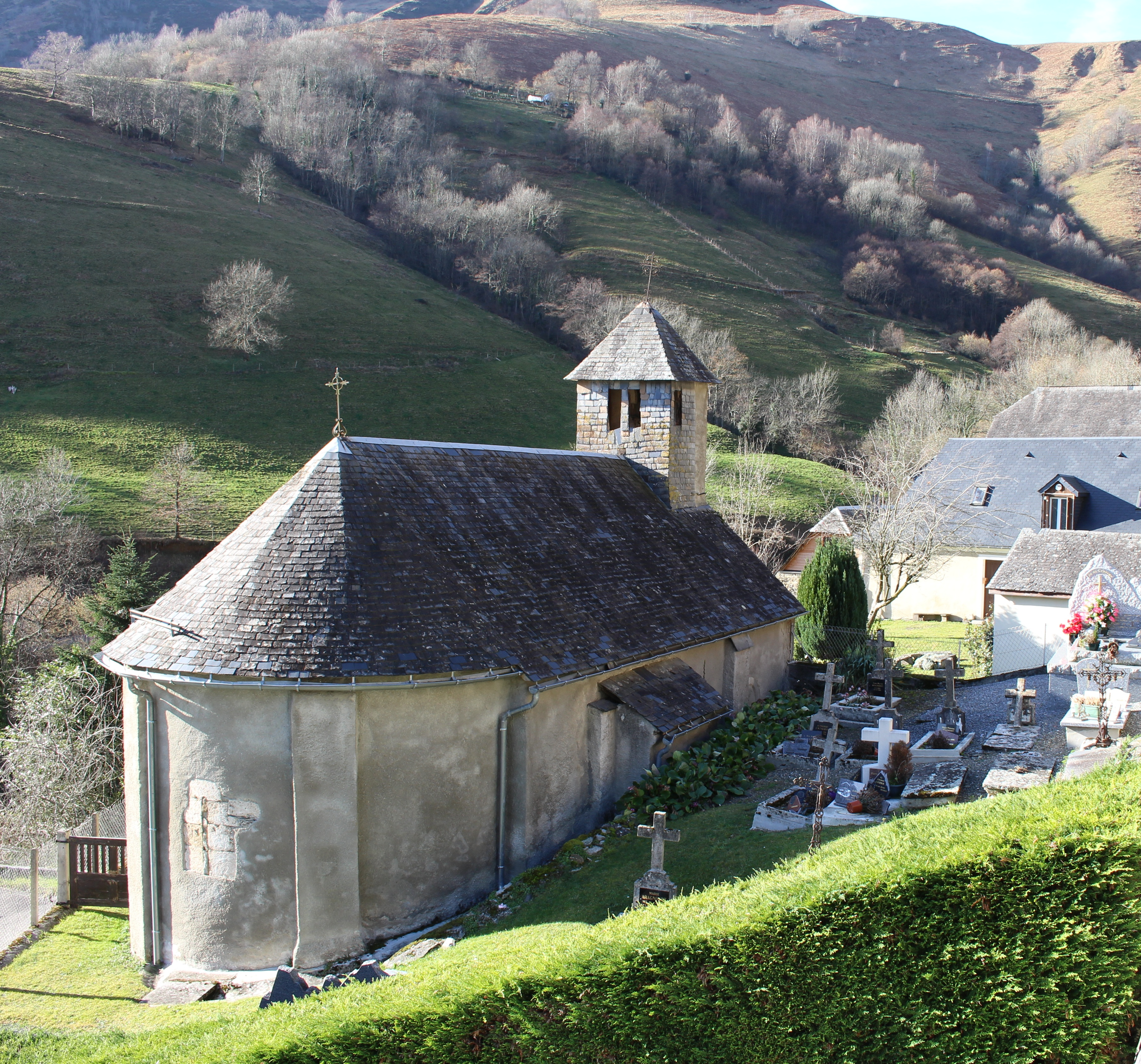 Église Saint-Pierre-aux-Liens d'Ourdon (Hautes-Pyrénées)